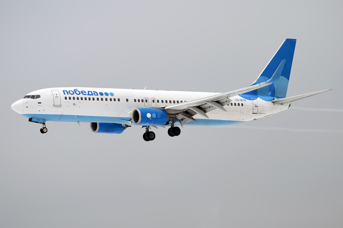 Pobeda, VQ-BTH, Boeing 737-8LJ